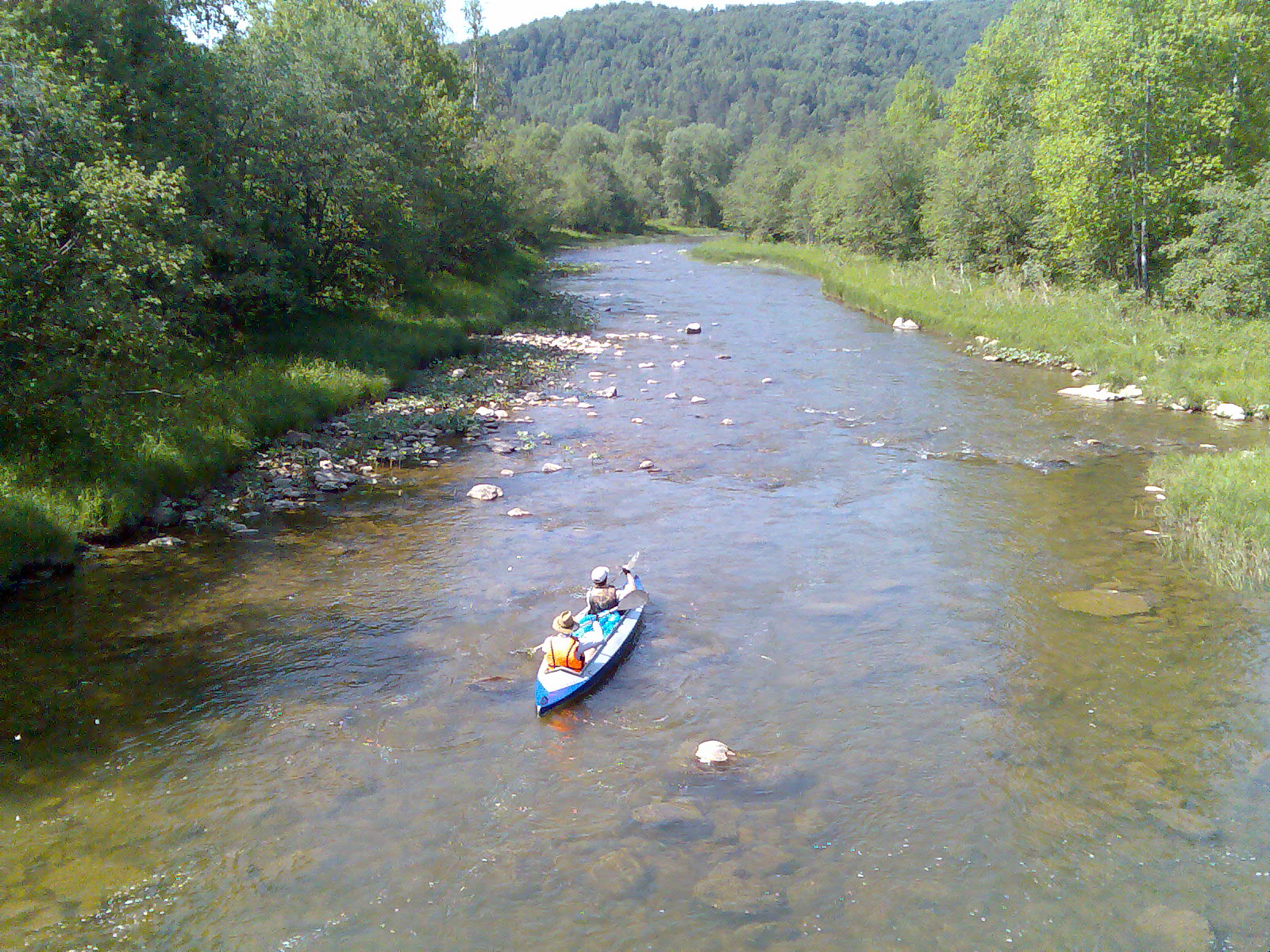 Зилим